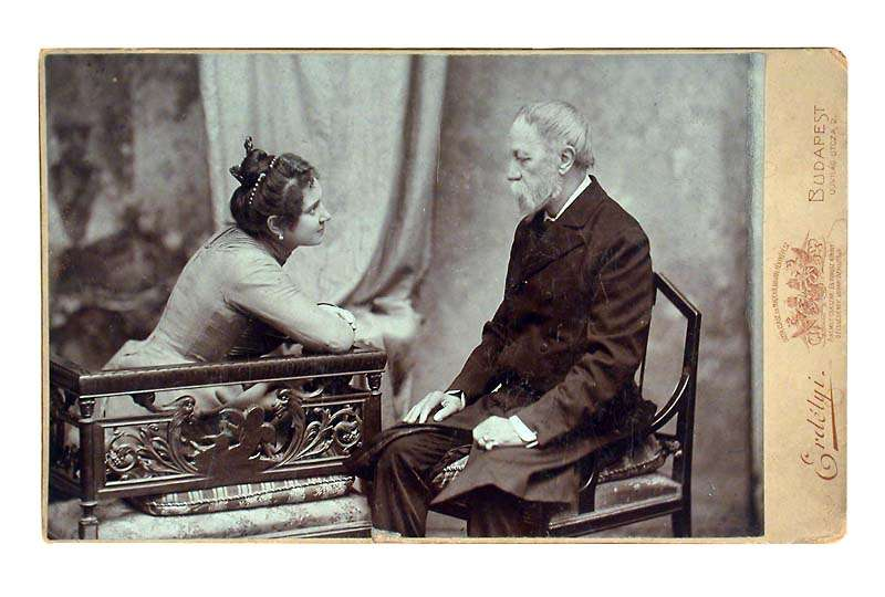 Nagy Bella és Jókai Mór